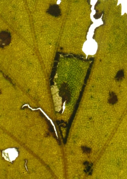 Mine von Stigmella luteella